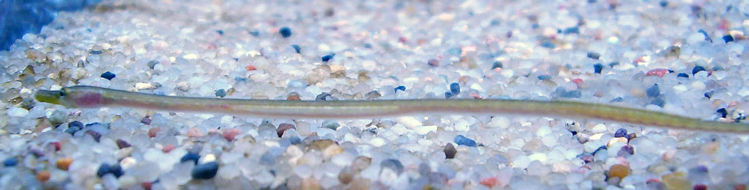 Wężynka (Nerophis ophidion) w Akwarium Gdyńskim